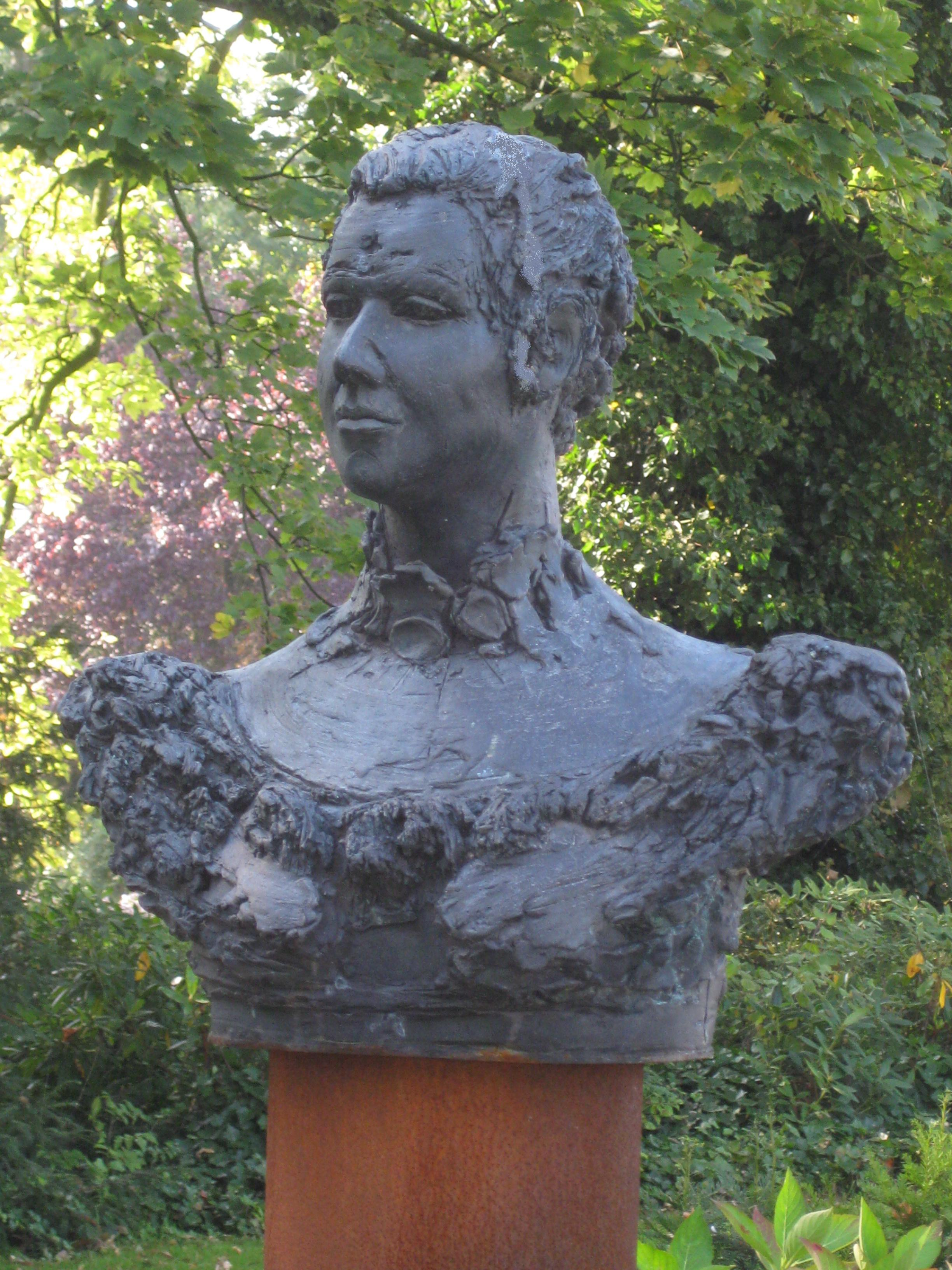 Beeld van Agneta van Marken-Matthes in het Agnetapark in Delft